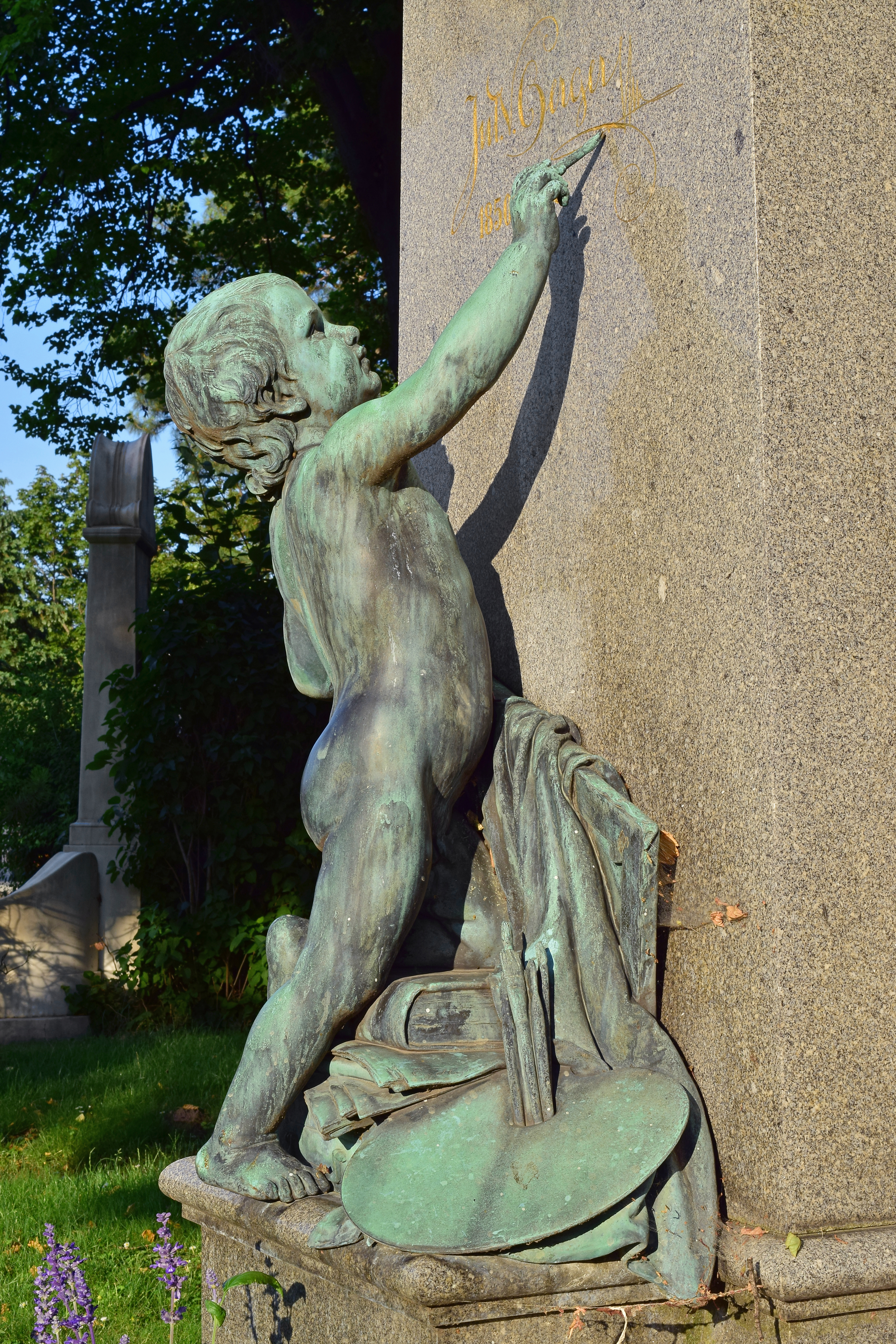 Ehrengrab von Julius Victor Berger auf dem Wiener Zentralfriedhof, geschaffen von Edmund Hofmann von Aspernburg.